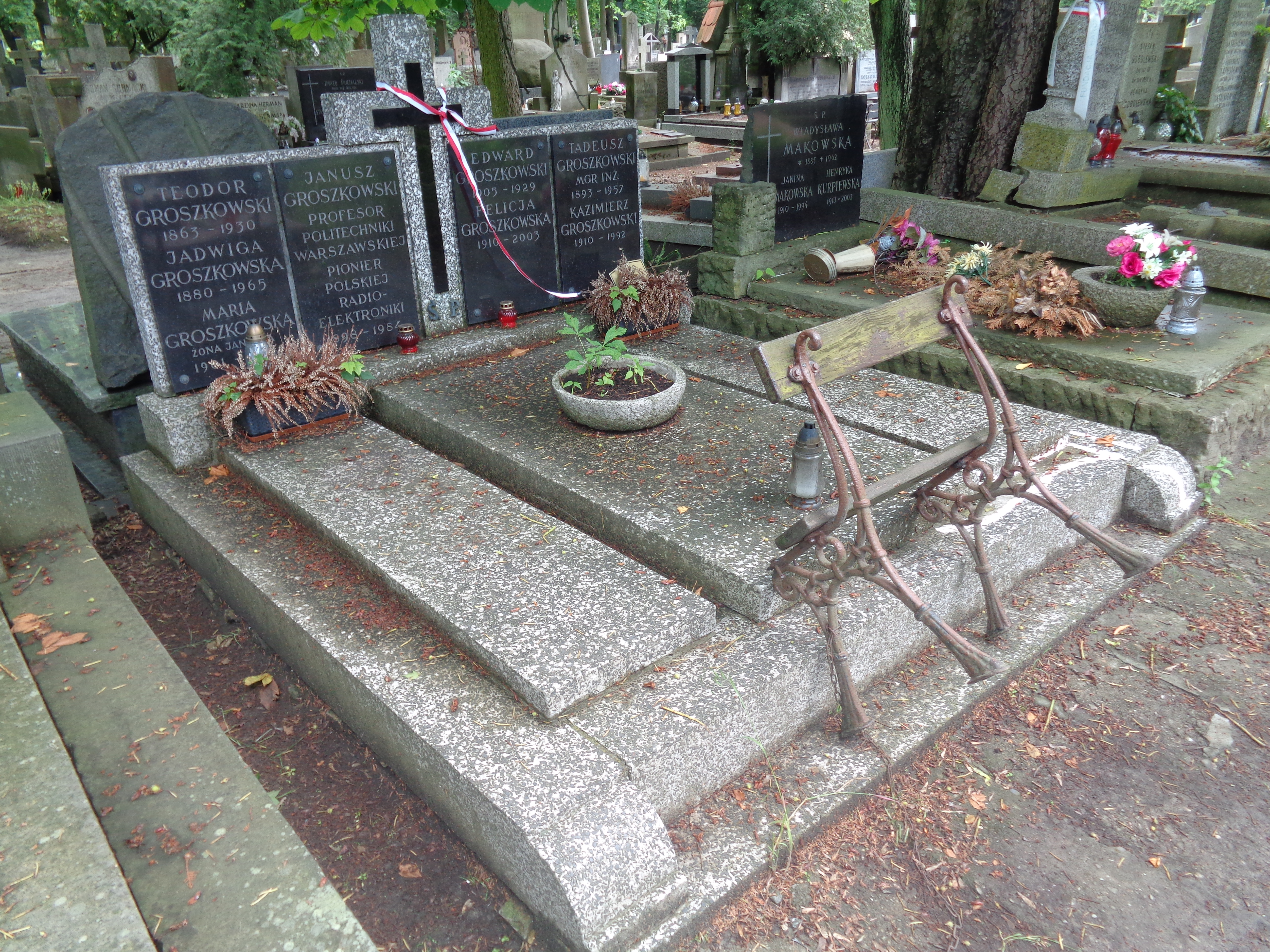 Grób Janusza Groszkowskiego na Cmentarzu Powązkowskim